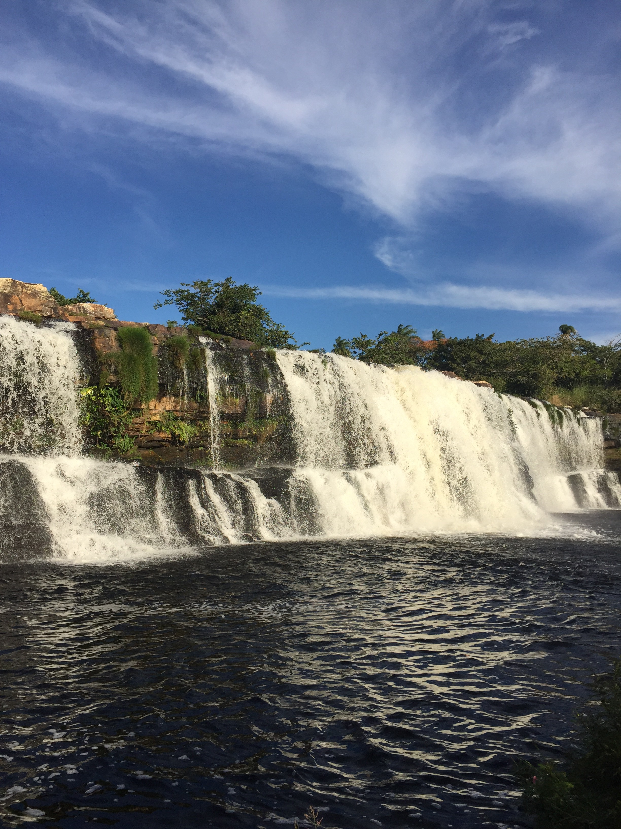 Cachoeira Grande - Serra do Cipó